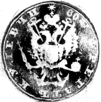 Оттиск печати фрегата Кулевчи